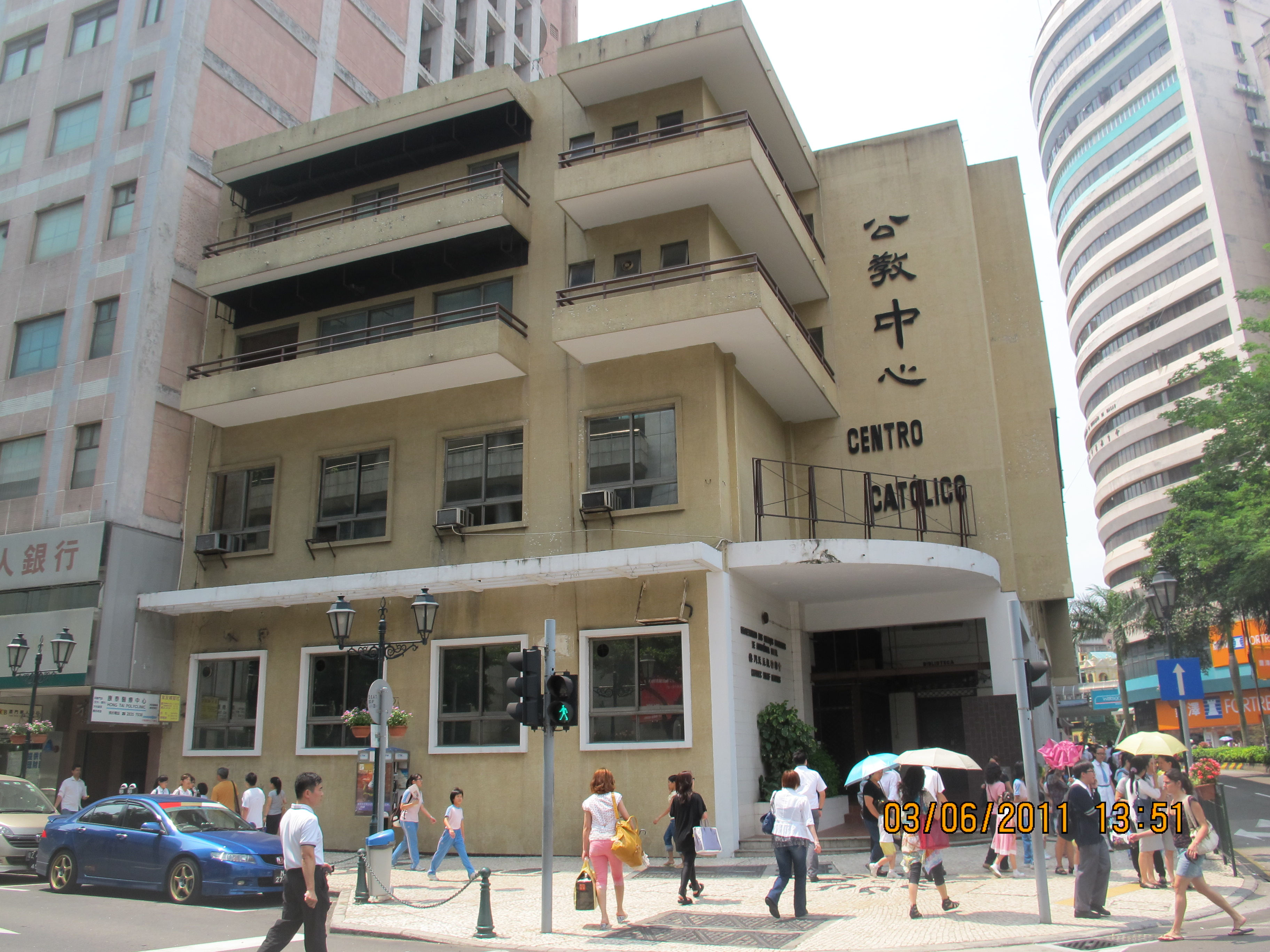 中文（香港）: 澳門公教中心